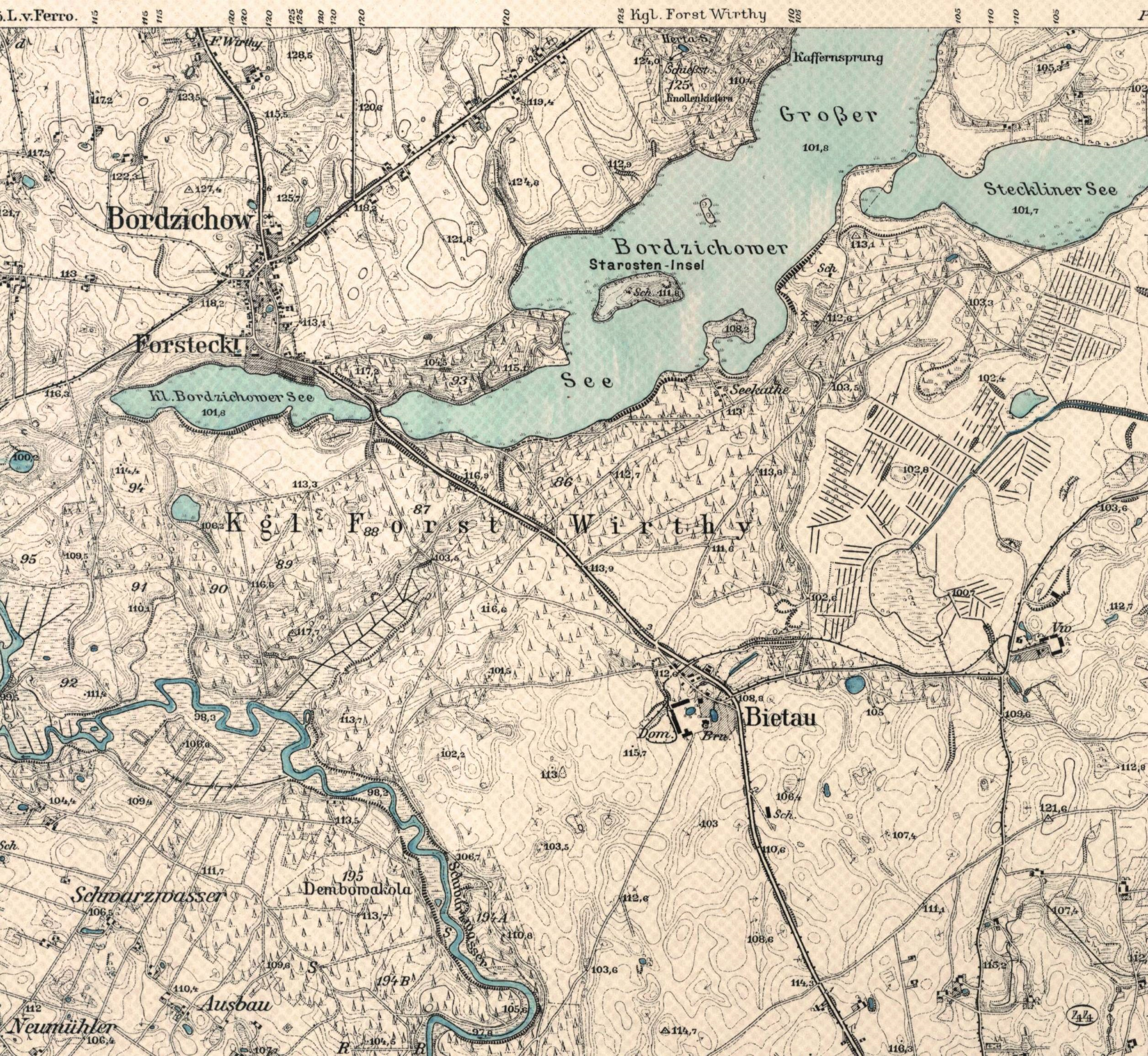 Karte Königlicher Forst Wirthy, Großer Bordzichower See (heute: Jezioro Borzechowskie Wielkie) und Umgebung 1908, Westpreußen. Heute: Wirty in der polnischen Gemeinde Zblewo (deutsch Hochstüblau), Powiat Starogardzki der Wojewodschaft Pommern.